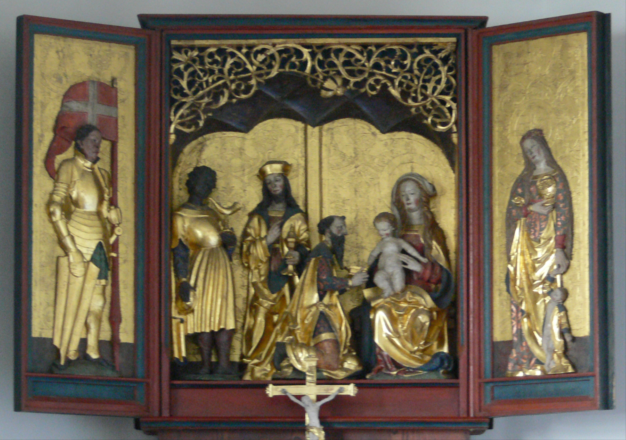 Pfarrkirche St. Martin, Aulendorf, Landkreis Ravensburg Dreiklönigsaltar, Altarretabel mit Mitte: Dreikönigsgruppe, um 1510, verschiedentlich Niklaus Weckman (Ulm) oder Michael Zeynsler (Biberach) zugeschrieben links: Hl. Georg (oder hl. Mauritius?) in Rüstung mit Fahne rechts: Hl. Dorothea mit Blumenkörbchen